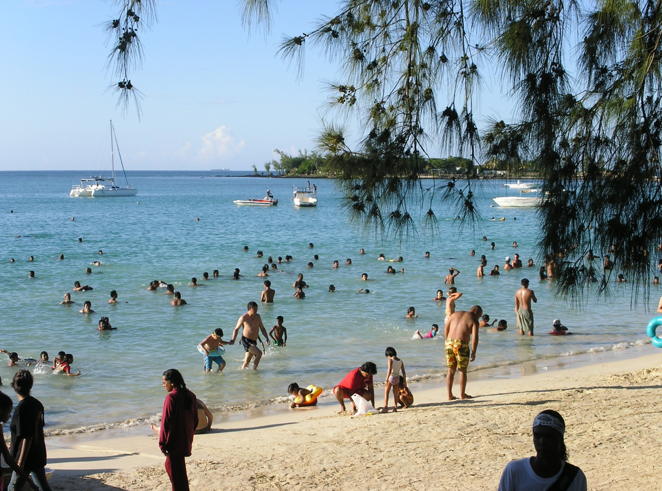 Pereybère Beach